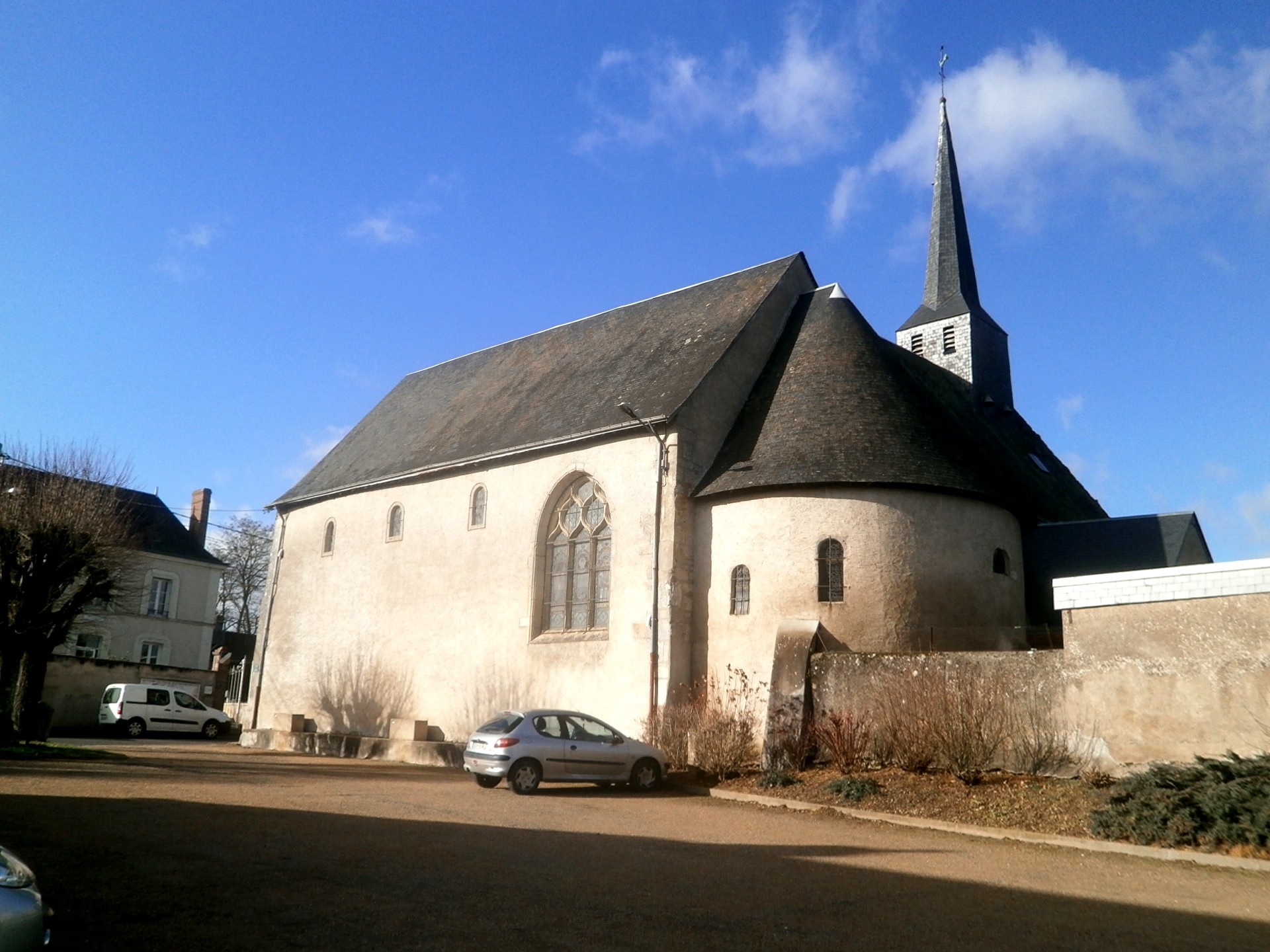 L'église de Saunay